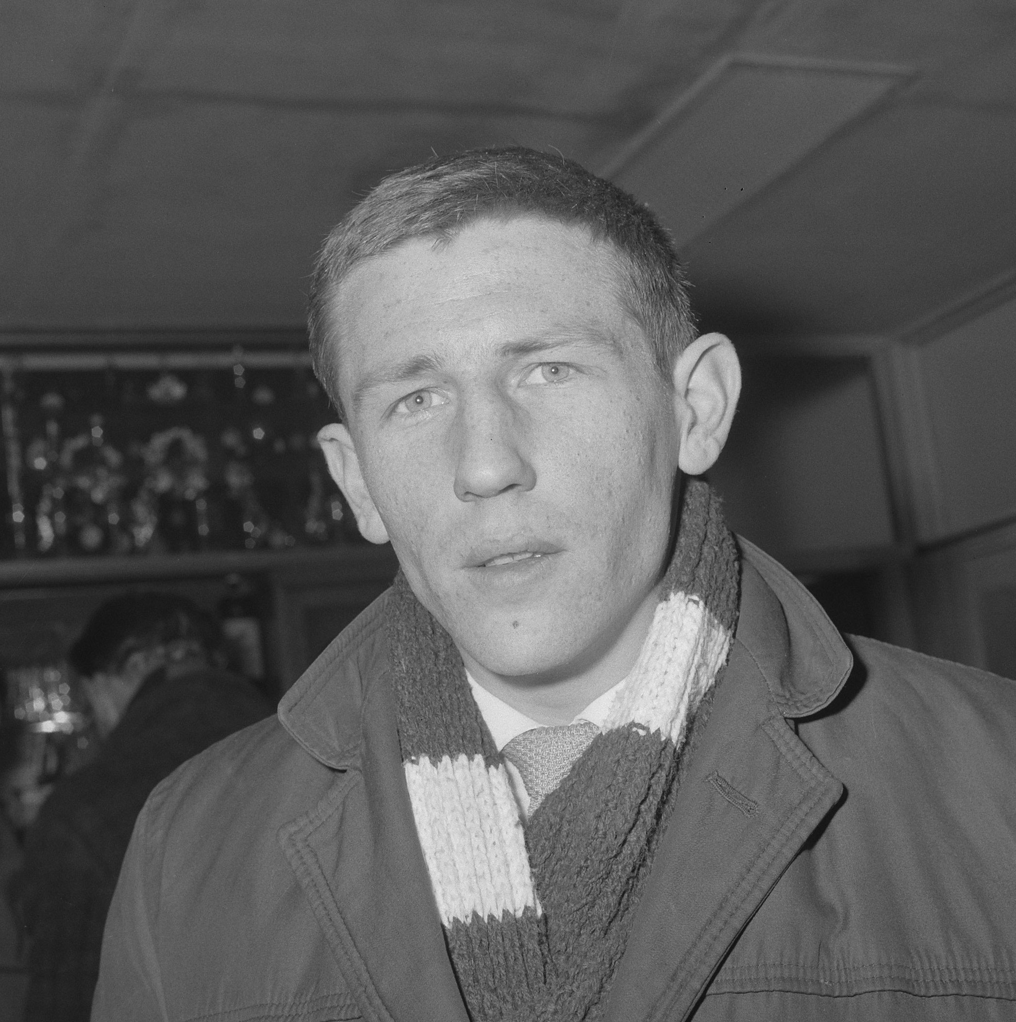 Collectie / Archief : Fotocollectie Anefo Reportage / Serie : [ onbekend ] Beschrijving : Spelers DWS Frans Geurtsen (kop) Datum : 4 maart 1965 Trefwoorden : SPELERS, sport, voetbal Persoonsnaam : Frans Geurtsen Fotograaf : Nijs, Jac. de / Anefo Auteursrechthebbende : Nationaal Archief Materiaalsoort : Negatief (zwart/wit) Nummer archiefinventaris : bekijk toegang 2.24.01.03 Bestanddeelnummer : 917-4997